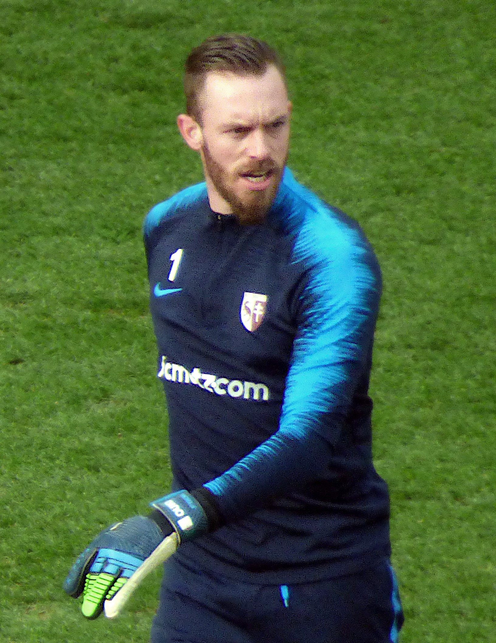 Alexandre Oukidja avant le match RC Lens / FC Metz, comptant pour la vingt-quatrième journée du championnat de France de Ligue 2 2018-2019, le 9 février 2019, au Stade Bollaert-Delelis.